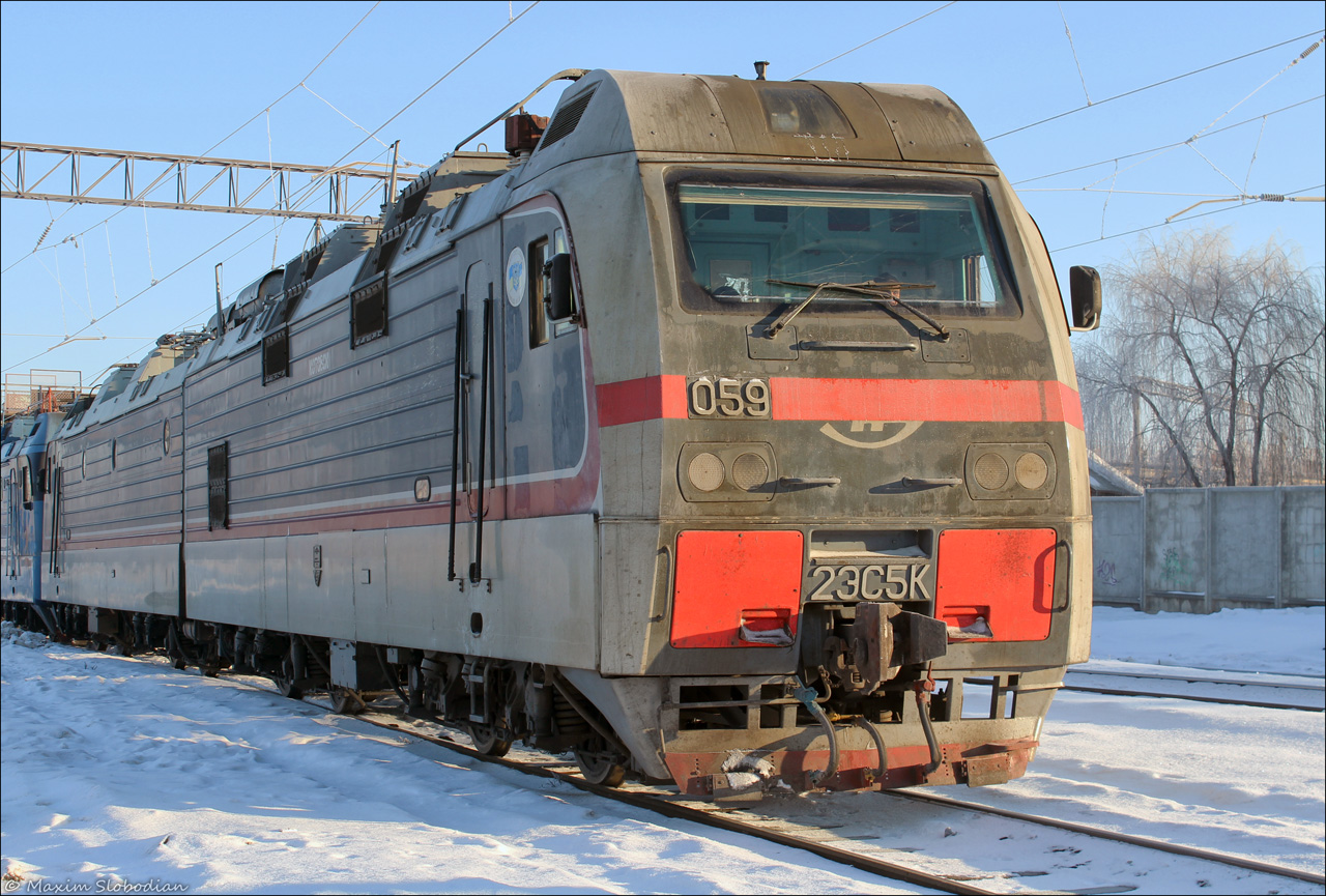 Электровоз 2ЭС5К-059 (ТЧ-2 Котовск), 13.01.2013. Украина, Винницкая область, станция Жмеринка